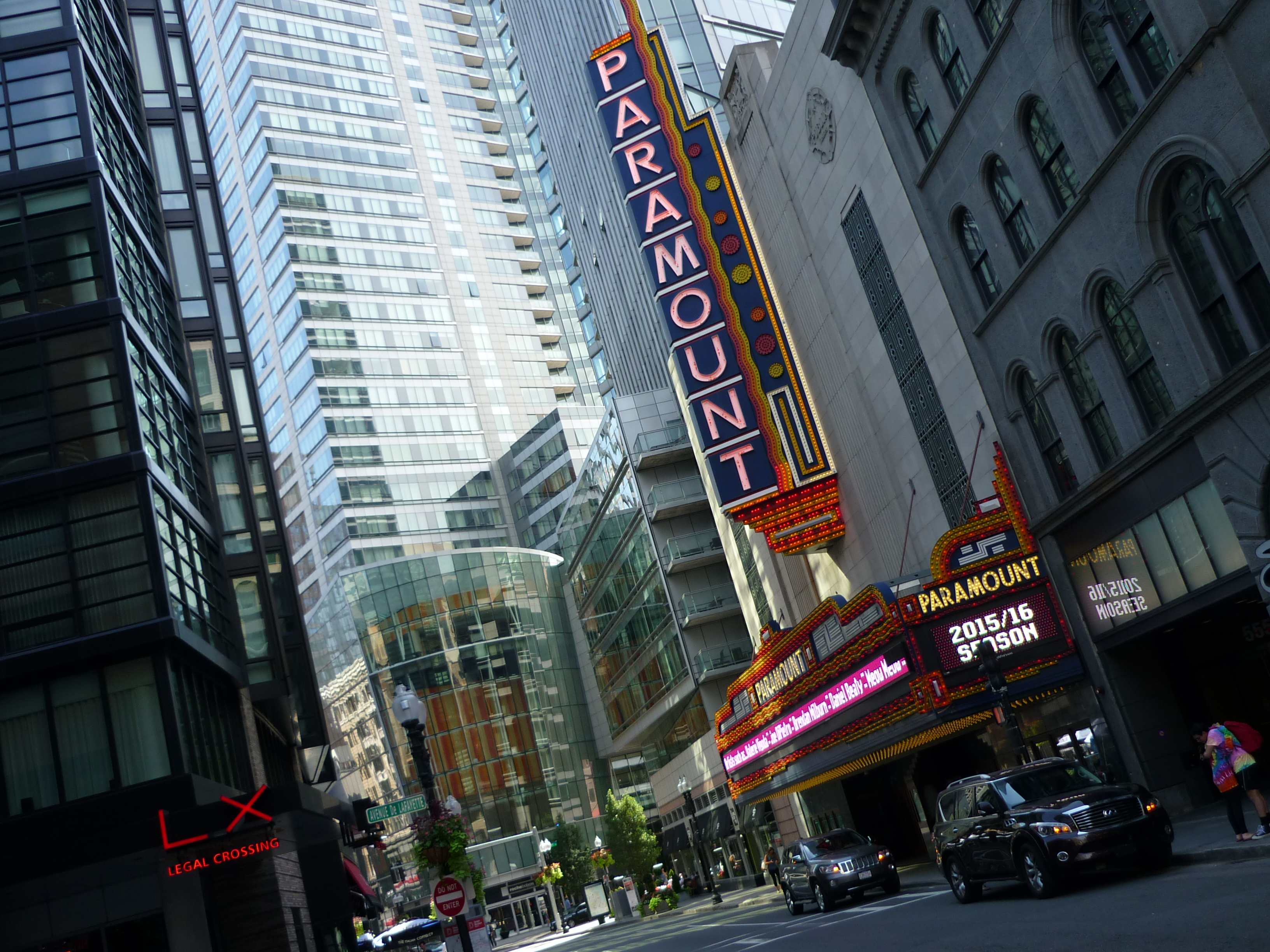 Angle Washingon St et Avenue de Lafayette à Boston avec un cinéma Paramount. Août 2015.